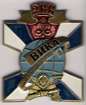 Cross VIKA